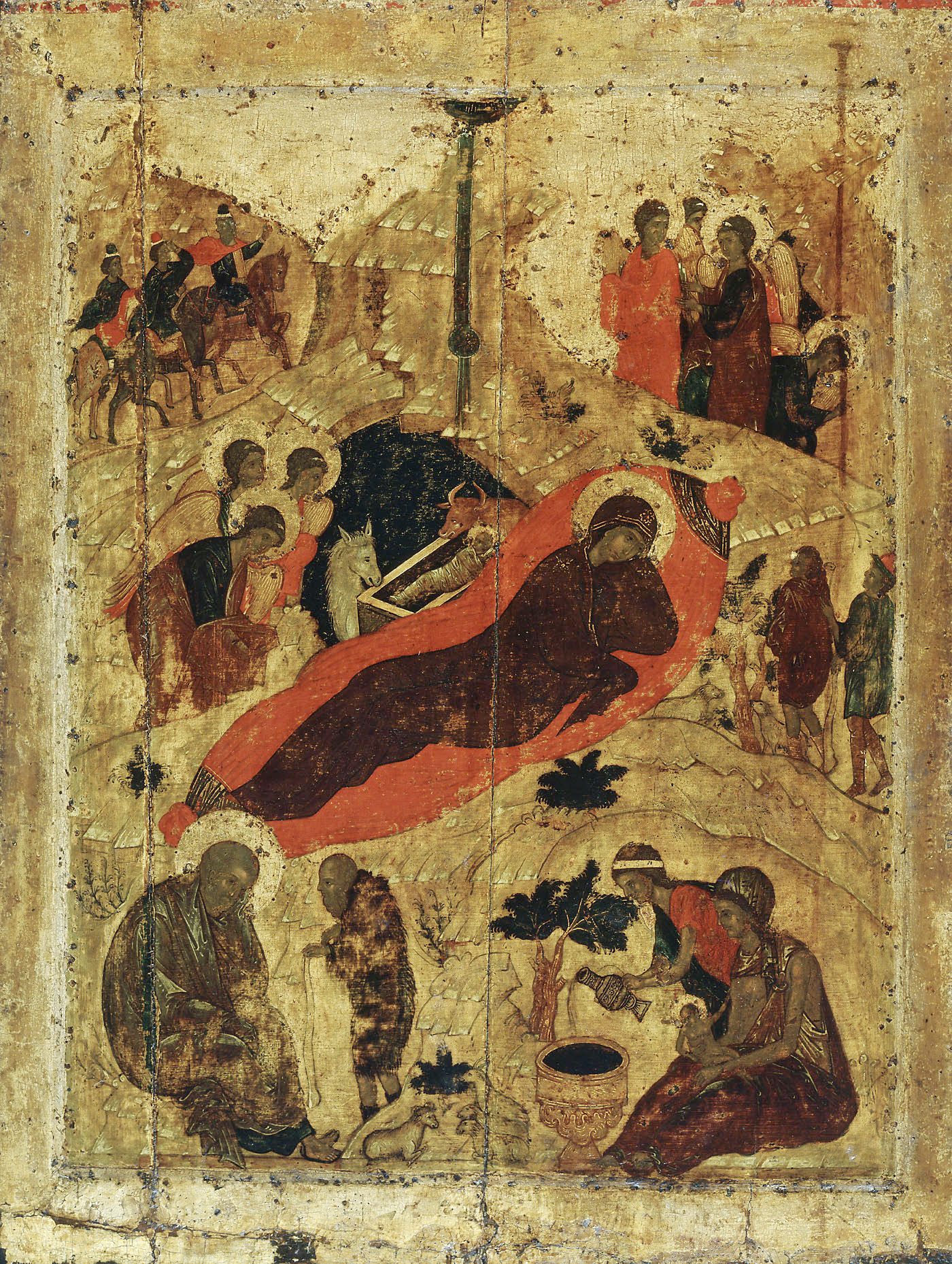 Икона из праздничного чина иконостаса Благовещенского собора Московского Кремля. Н. В. Лазарев отмечал интересное изменение, внесённое в этой иконе в традиционную иконографию Рождества Христова: славословящие ангелы помещены не в левом верхнем углу композиции, как мы это обычно находим в византийских изображениях, а представлены склоненными около яслей, к которых покоится Младенец. Тем самым они становятся прямыми участниками акта поклонения Новорождённому, что вносит совсем новый, более интимный эмоциональный оттенок в изображенную сцену. Позднее М. В. Алпатов указал, что мотив ангелов, поклоняющихся Младенцу в яслях, имеется во фреске на ту же тему в церкви Перивлепты в Мистре.